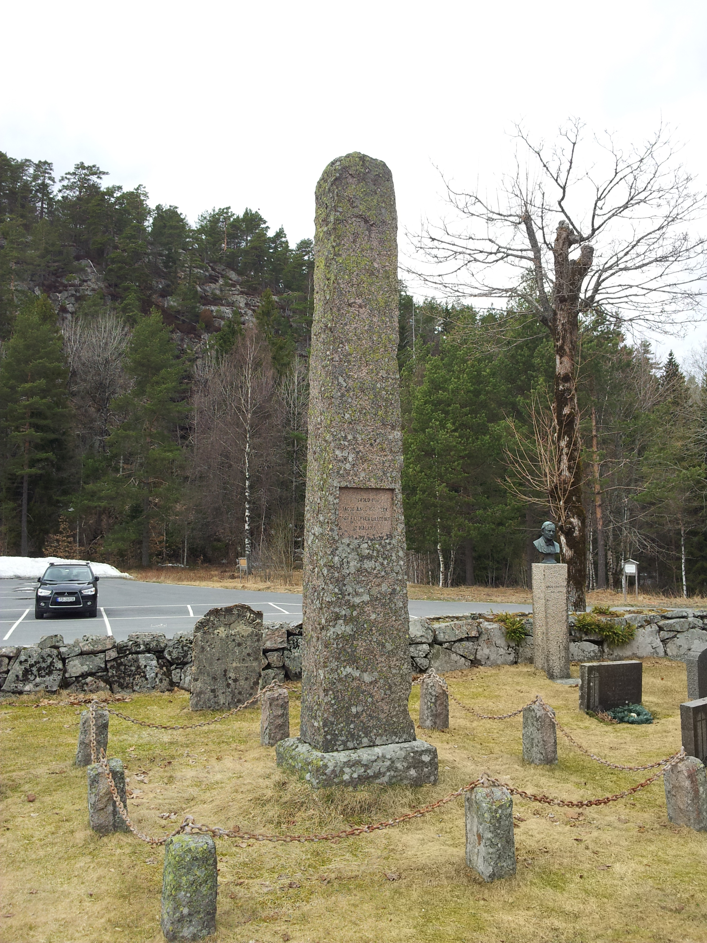 Støtte på Holt kirkegård med inskripsjonen: Eidsvoll 1814 - Jacob Aall Nesverk - Thor Reiersen Lilleholt - 17 mai 1814